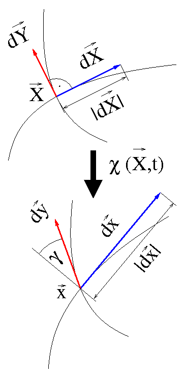 Veränderung der Tangenten an materielle Linien im Zuge einer Deformation